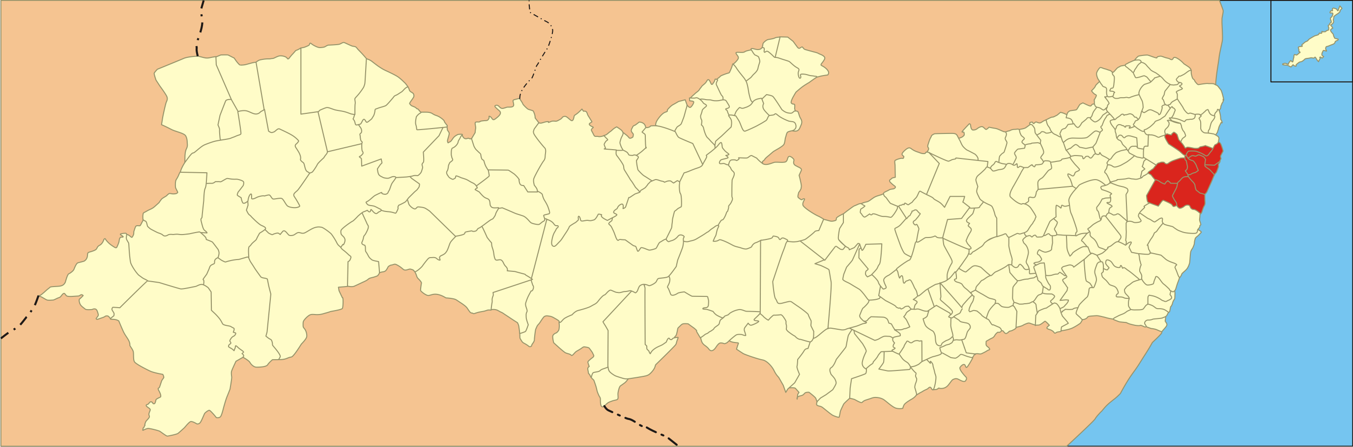 Localização da micro-região do Recife no estado de Pernambuco.